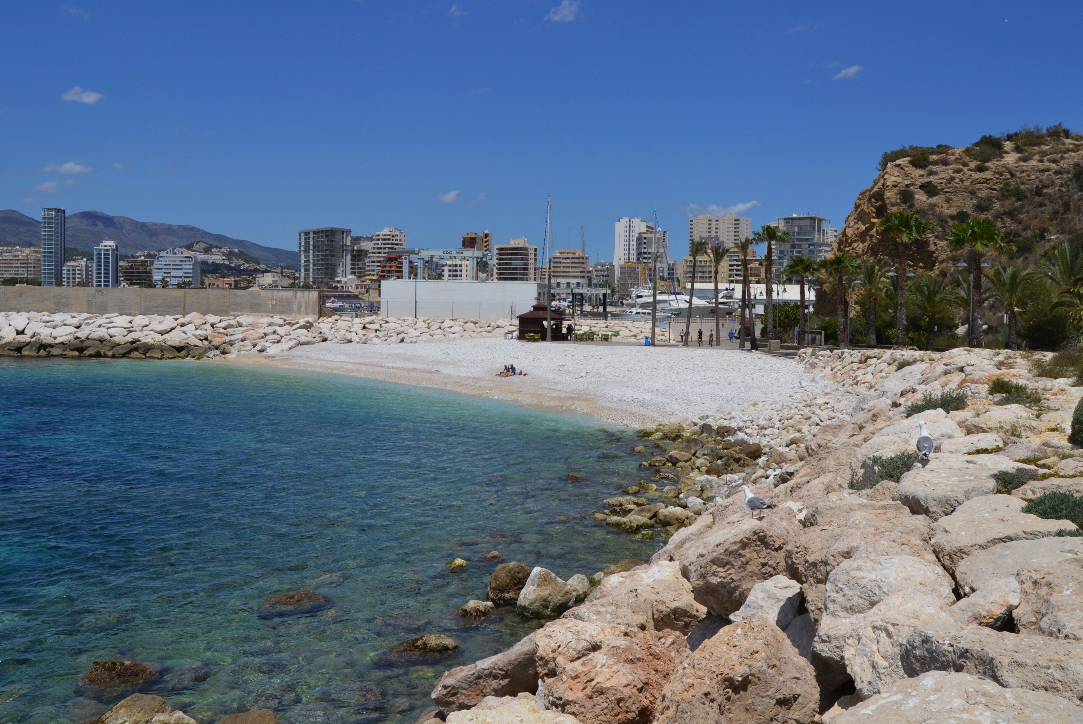 Vista de la cala del Racó de Calp. This is a a photo of a beach in the Land of Valencia, Spain, with id: PL-1286